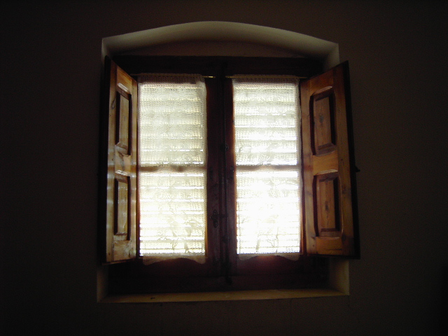 Ventana antigua vista desde el interior del edificio.